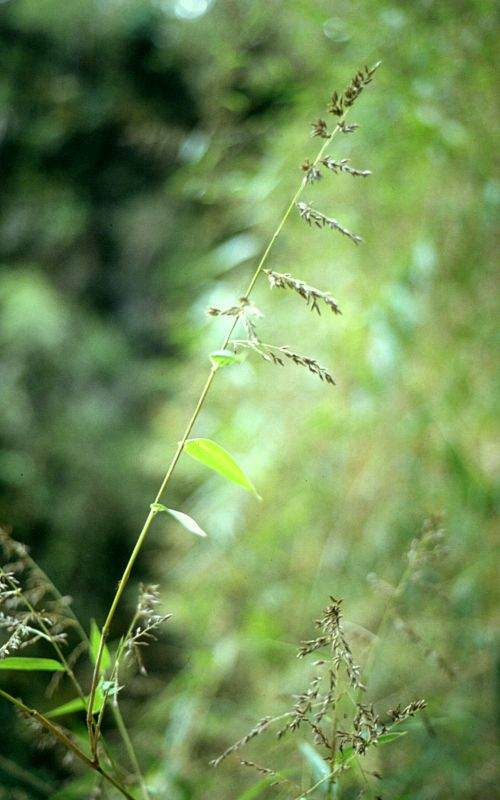 Chusquea quila, Poaceae - Chile, Salto de Petrohué (Prov. de Llanquihue)